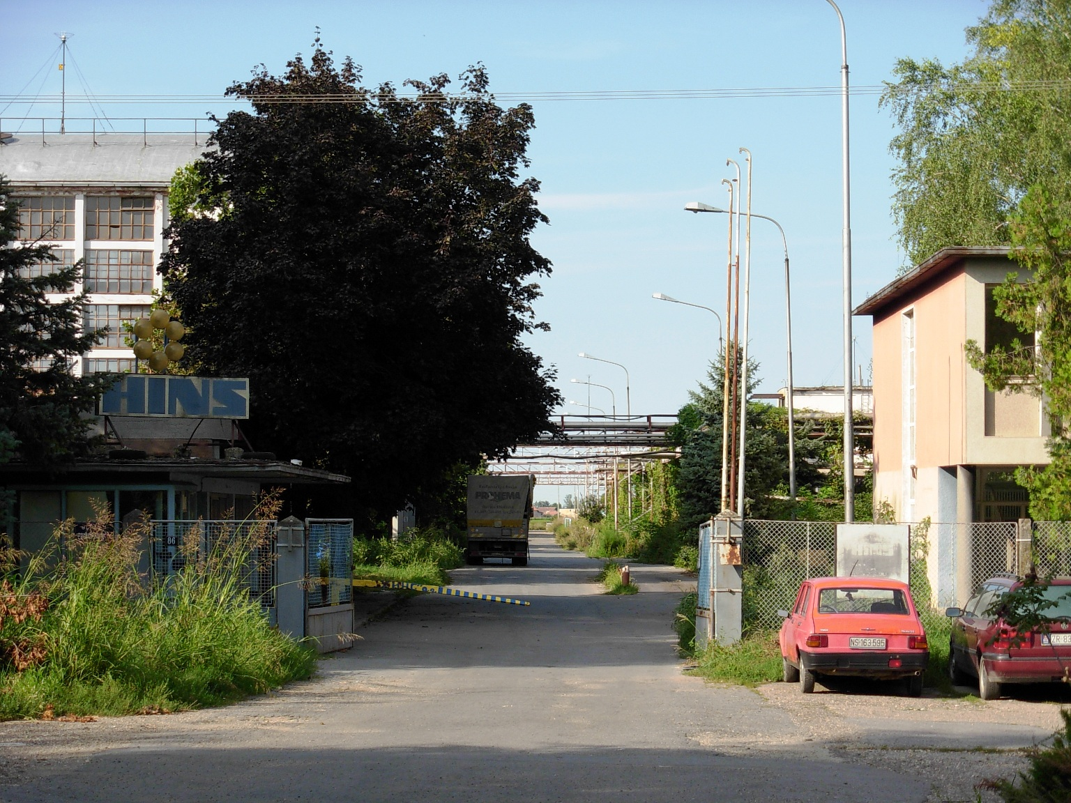 Ulaz u kompaniju "HINS" u Novom Sadu.